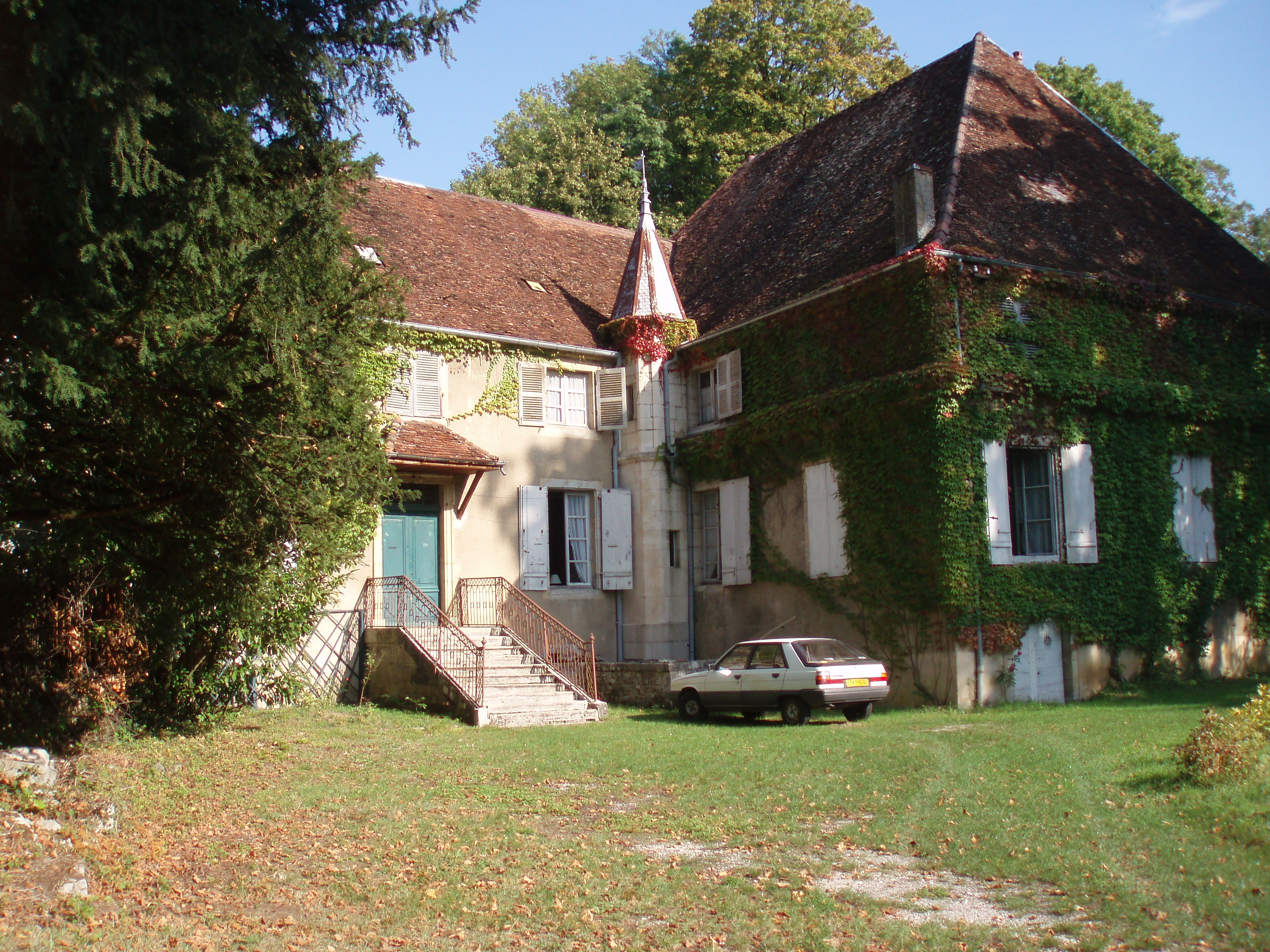 Château de Verreux en Arbois .